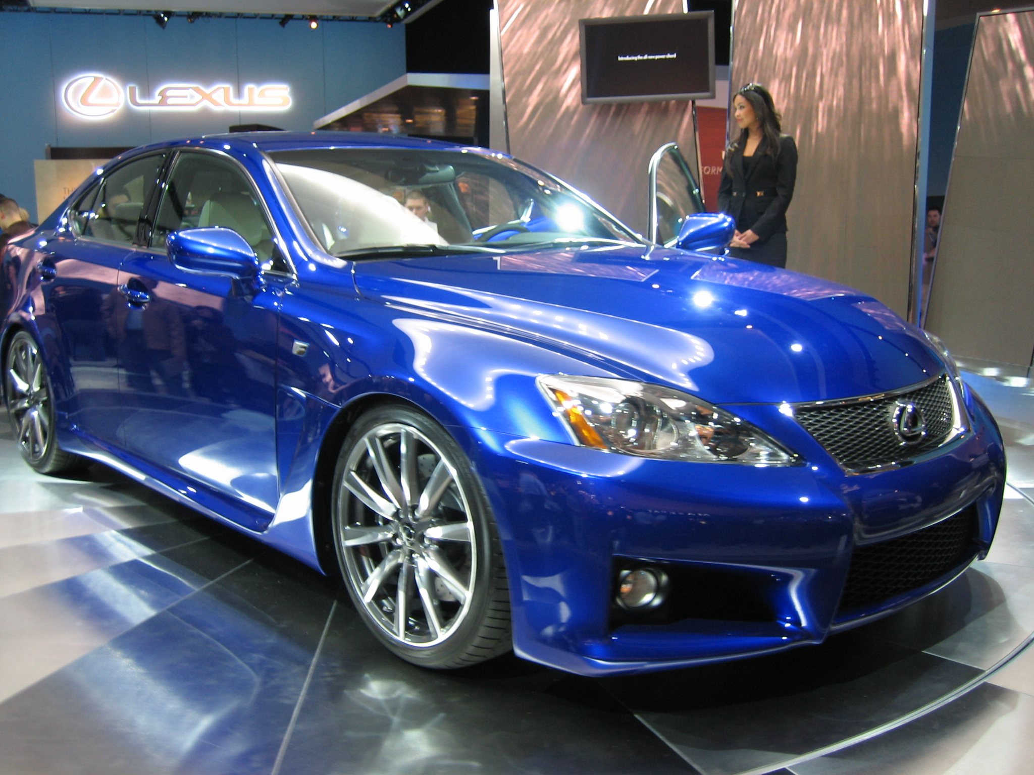 Lexus IS-F Ultrasonic Blue Metallic